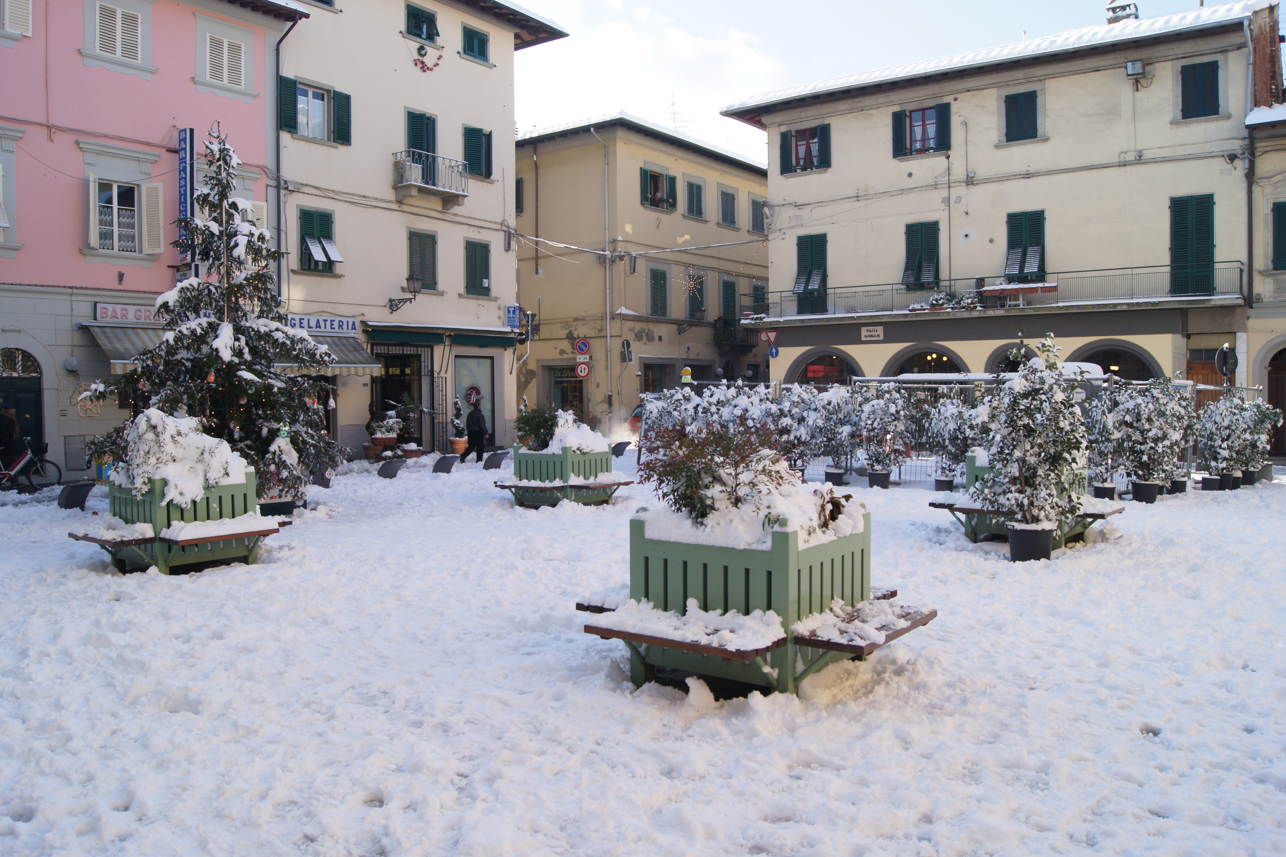 Piazza Garibaldi a Santa Croce sull'Arno (PI) dopo la nevicata del 17/12/2010